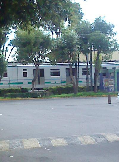 Tren ligero de la Ciudad de México. El tren es un TE-90 aproximándose a la estación Huichapan en dirección Taxqueña.